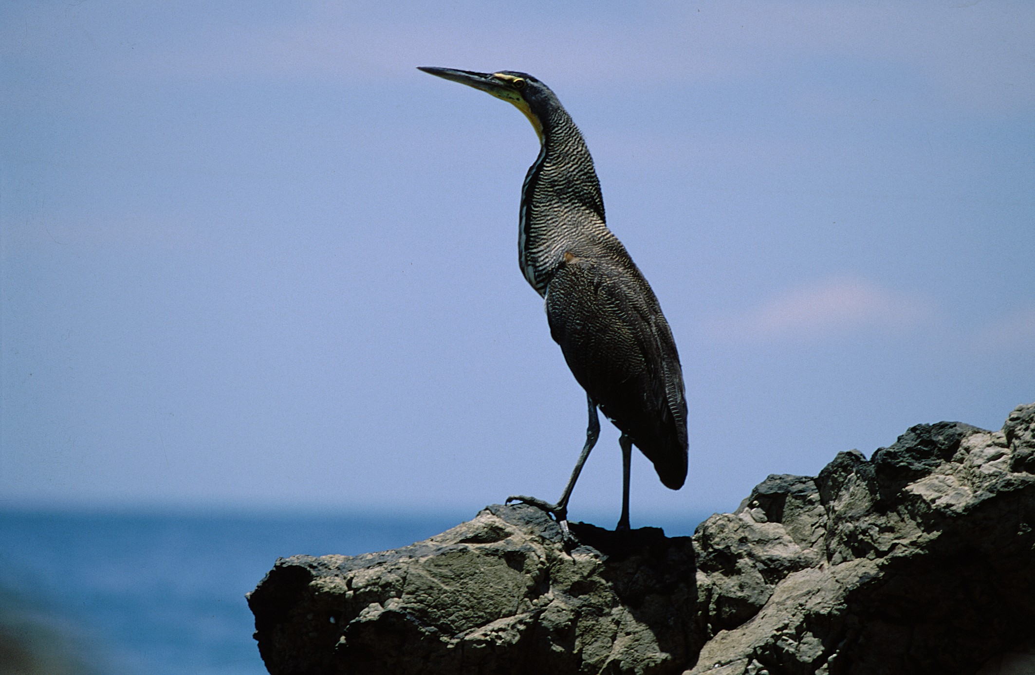 Tigrisoma mexicanum, Costa Rica